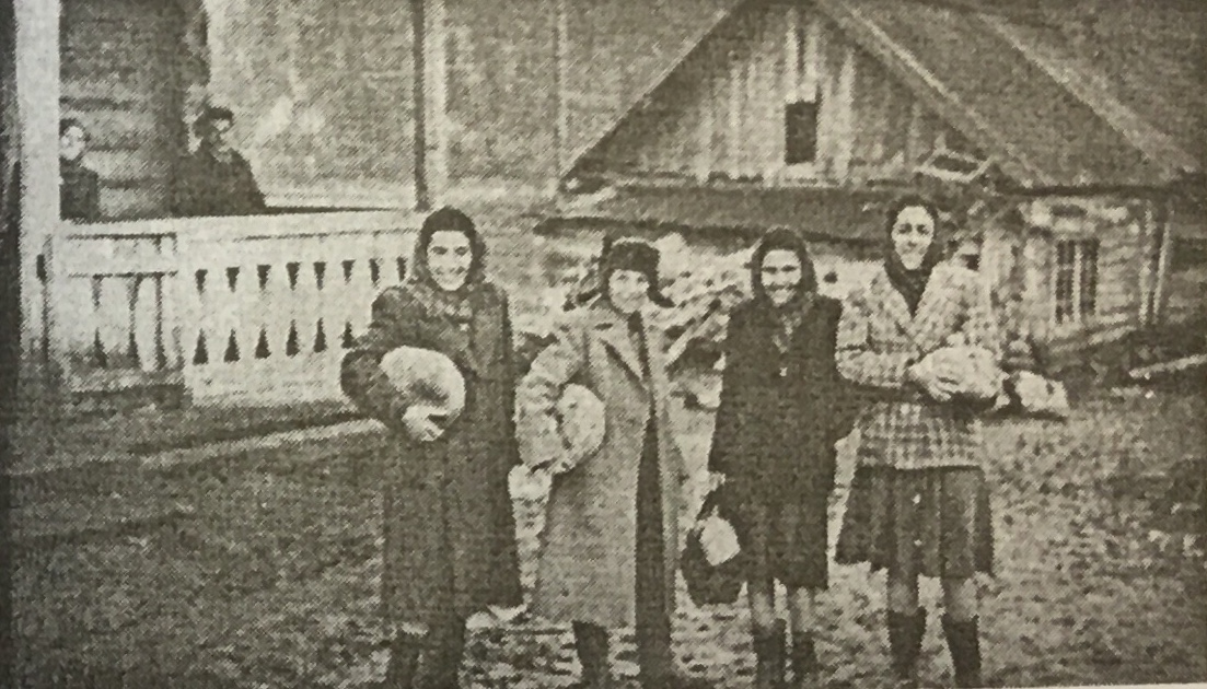 1949 թվականի հունիսի 14 Հայաստանցի աքսորվածները Սիբիրի Ռասսիպնայա ավանում